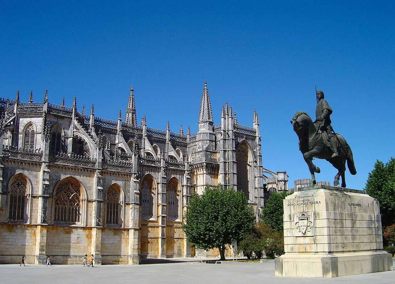 Mosteiro de Sta. Maria da Vitória